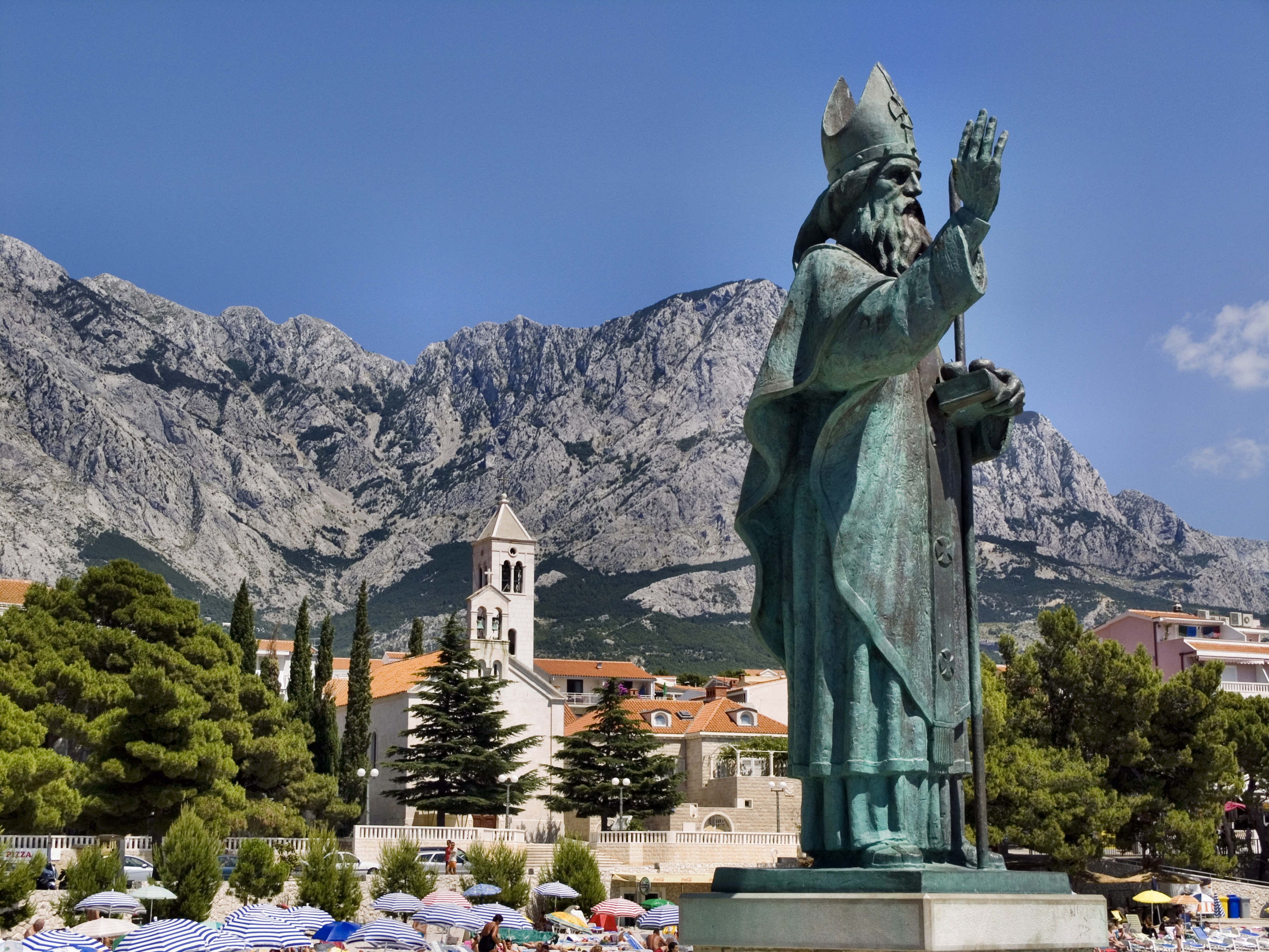 Хорватия, Башка Вода, Церковь Святого Николая